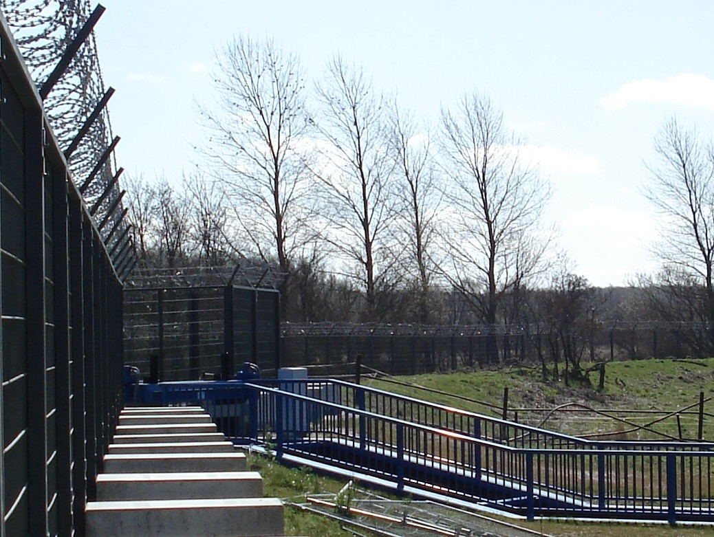 Schutzzaun für den G8-Gipfel 2007 an der Jemnitzschleuse bei Heiligendamm